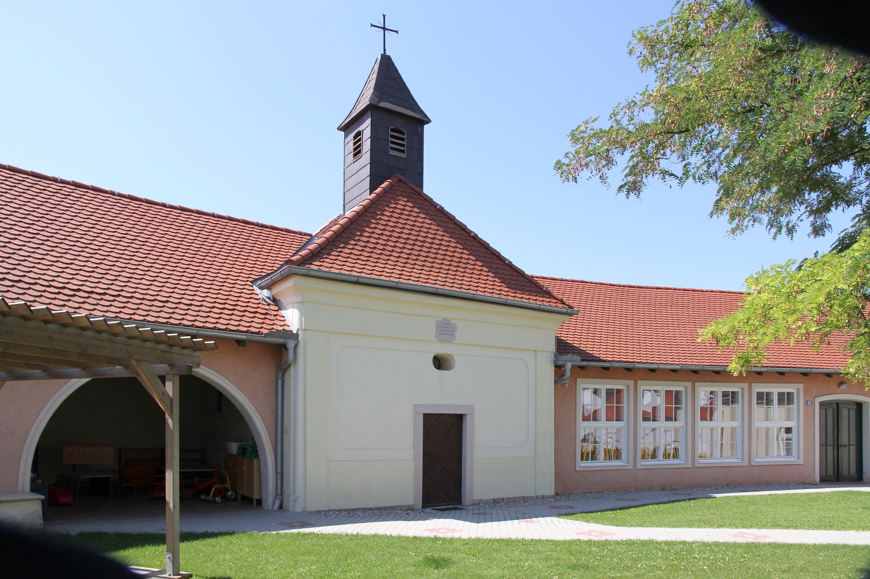 Die Kreuzkapelle in der burgenländischen Marktgemeinde Oggau am Neusiedler See.